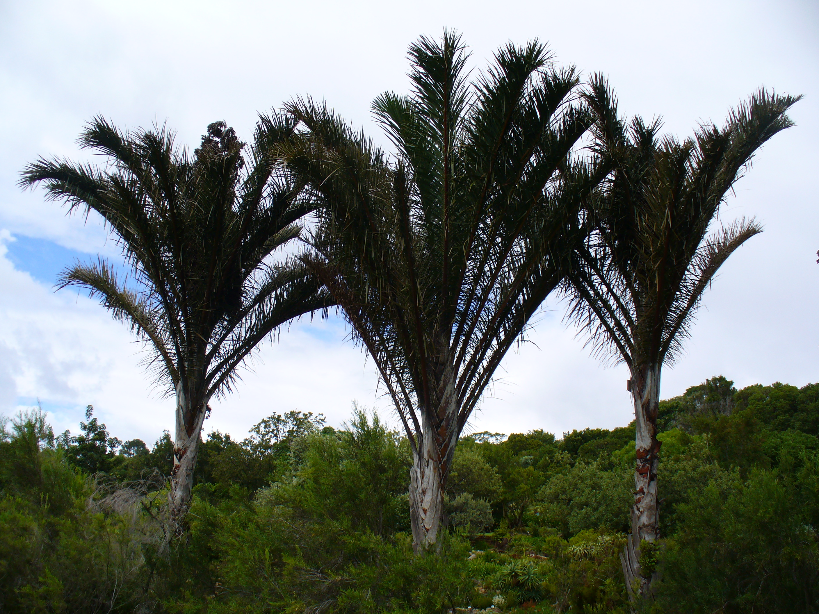 Kosi Palm